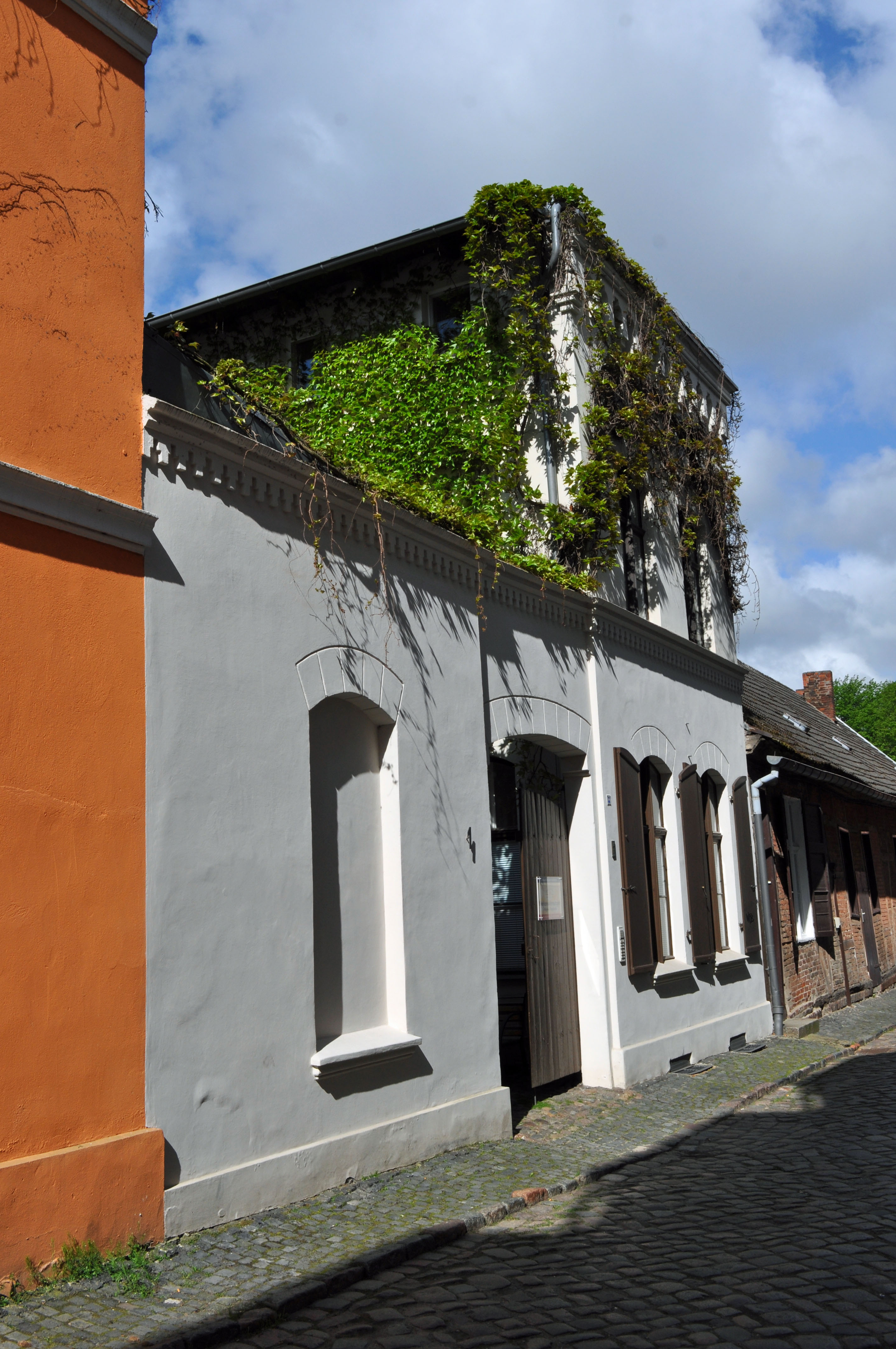 Gebäude in Stralsund, siehe Dateiname